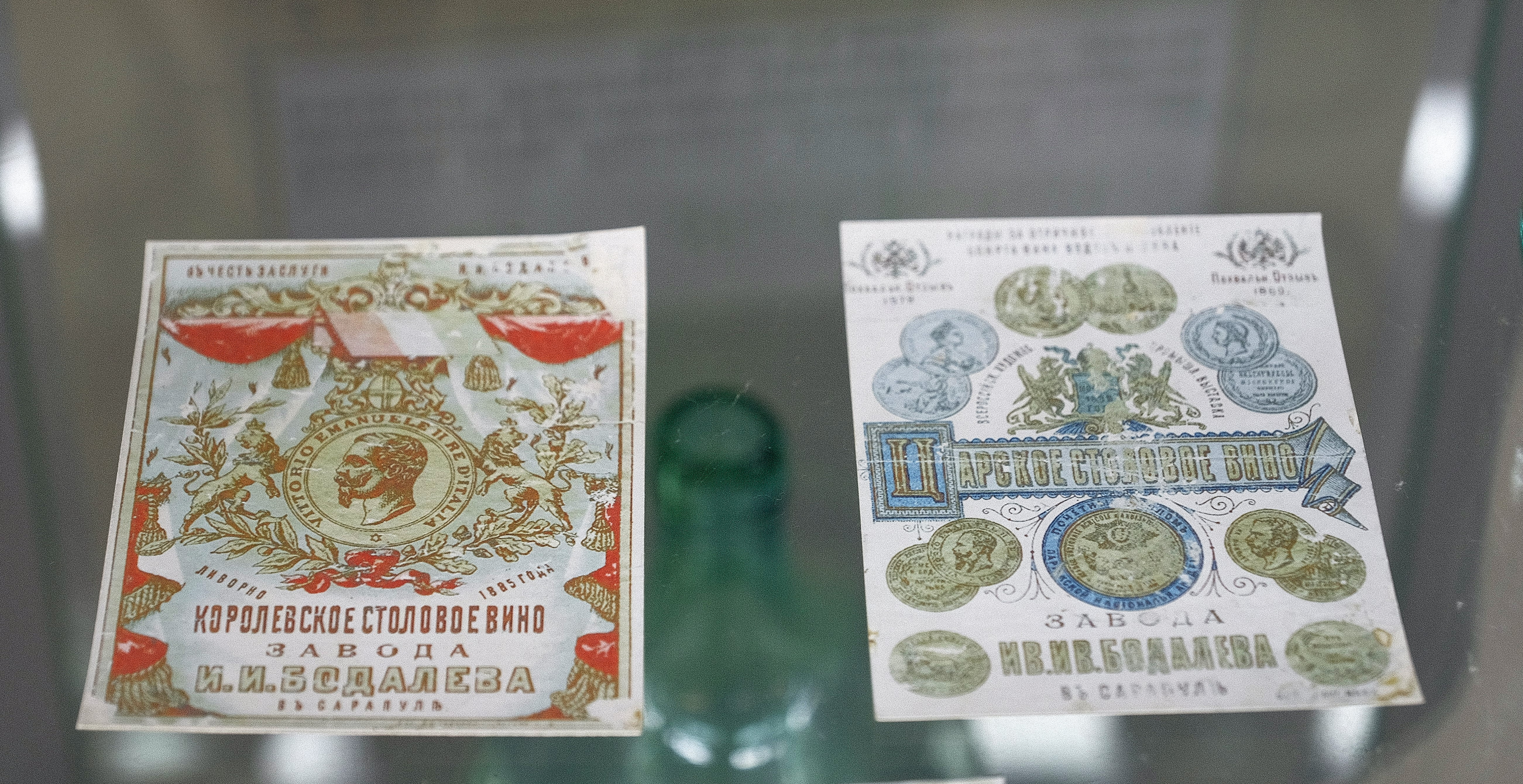 Этикетки винных бутылок пивоваренных заводов Бодалёвых (экспозиция Национального музея Удмуртской республики им. Кузебая Герда).